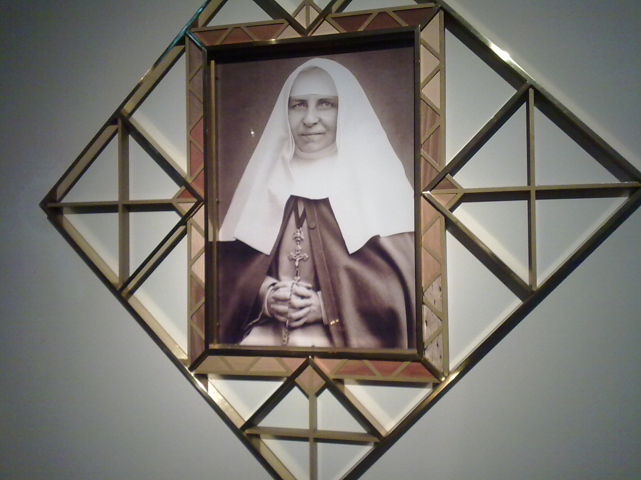 Ich habe diese Aufnahmen am 22. Oktober 2011 bei den Steyler Missionaren in den Niederlanden durchgeführt.